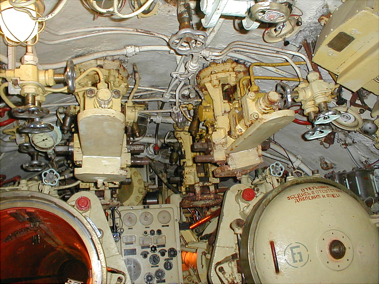 Sous marin conventionnel Russe de classe FoxTrot ici FoxTrot 480 servant de musée et amarré à Zeebruges